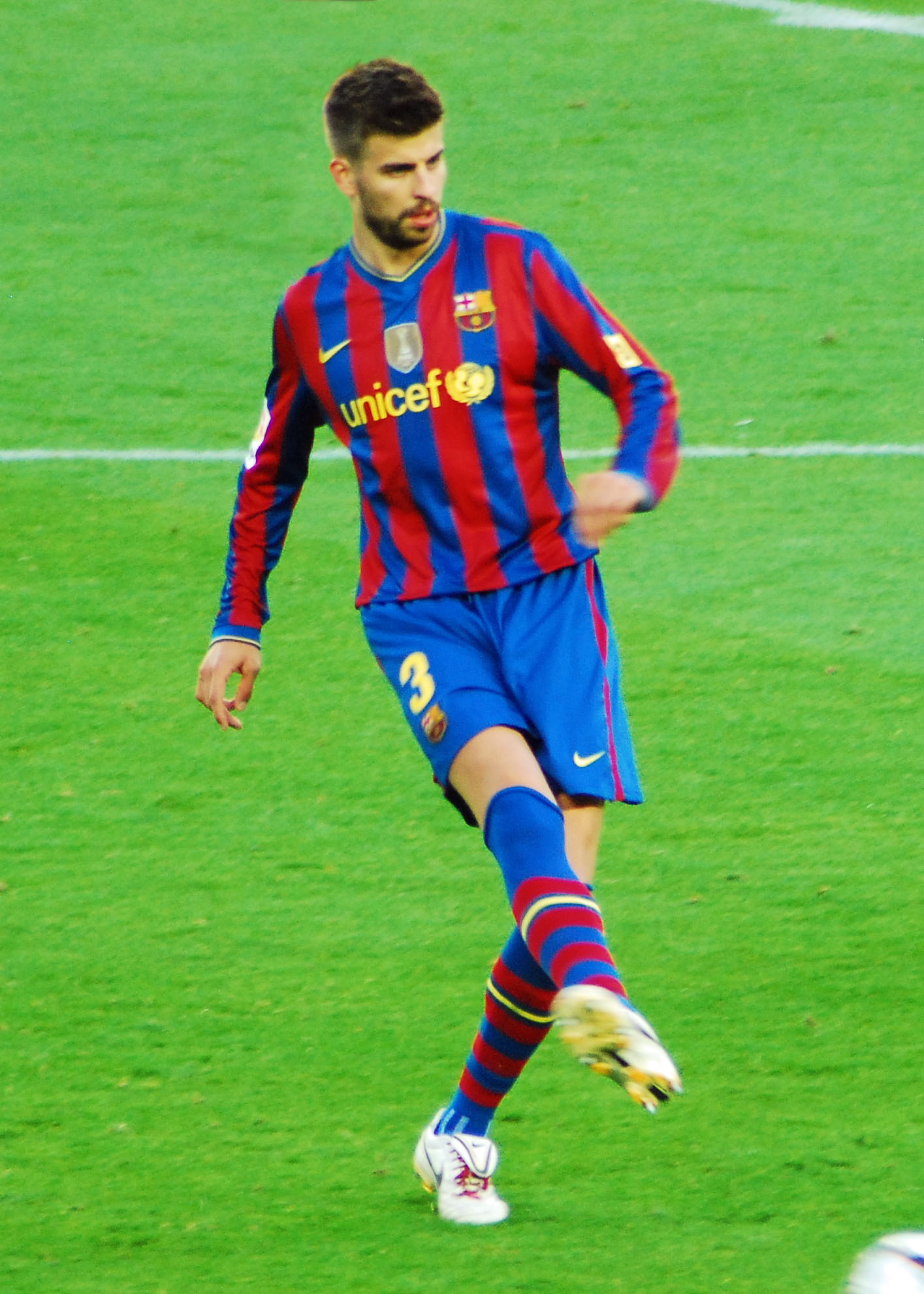 Gerard Piqué realizando un pase.